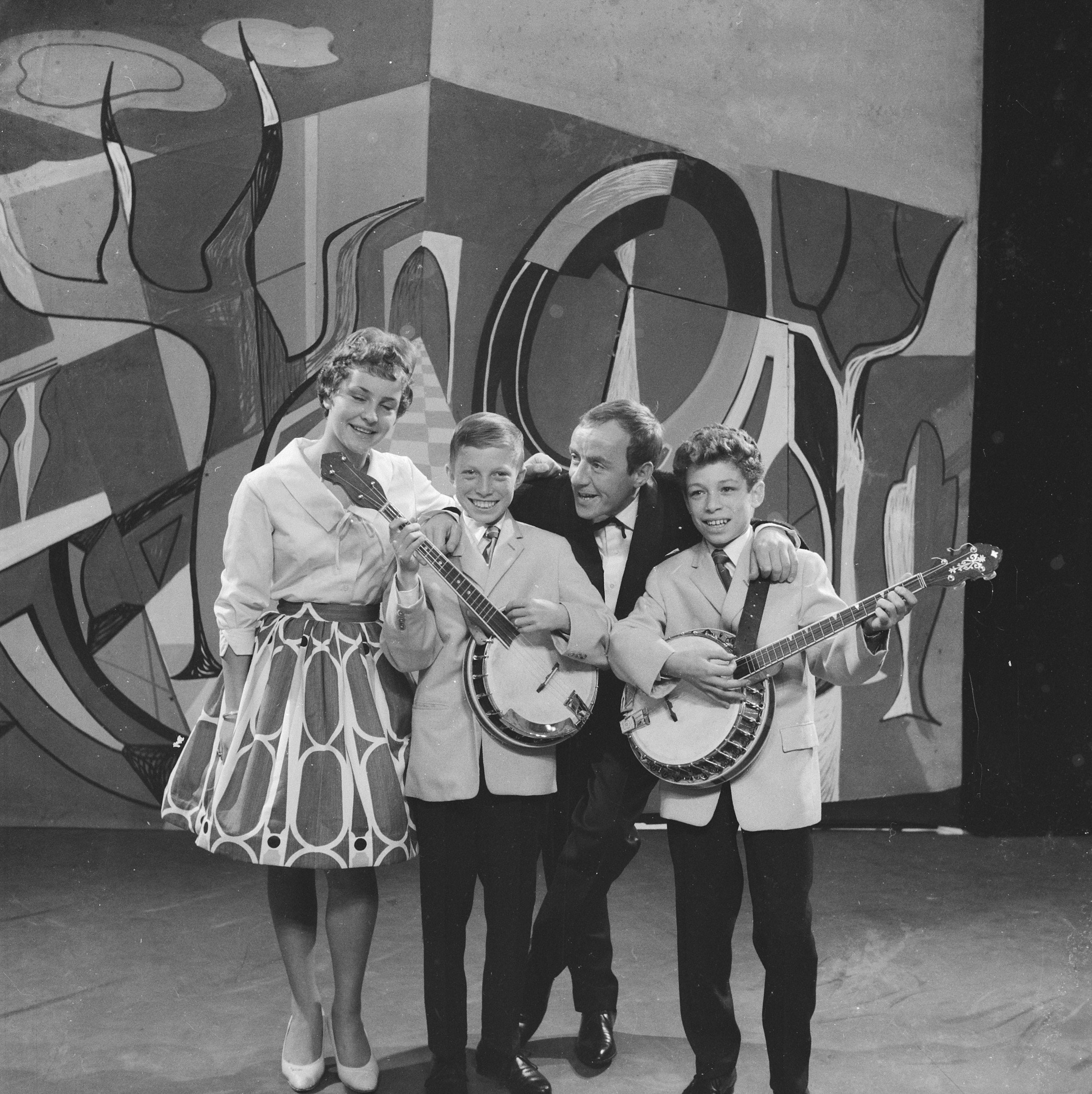 Collectie / Archief : Fotocollectie Anefo Reportage / Serie : [ onbekend ] Beschrijving : AVRO Weekend Show, het Deense duo Jan en Kjeld met Johnny Kraaijkamp Datum : 3 oktober 1959 Trefwoorden : artiesten, muziek, programma's, televisie Persoonsnaam : Avro Weekend Show, Jan en Kjeld, Kraaijkamp, Johnny (sr.) Fotograaf : Lindeboom, Henk / Anefo, [onbekend] Auteursrechthebbende : Nationaal Archief Materiaalsoort : Negatief (zwart/wit) Nummer archiefinventaris : bekijk toegang 2.24.01.03 Bestanddeelnummer : 910-7214